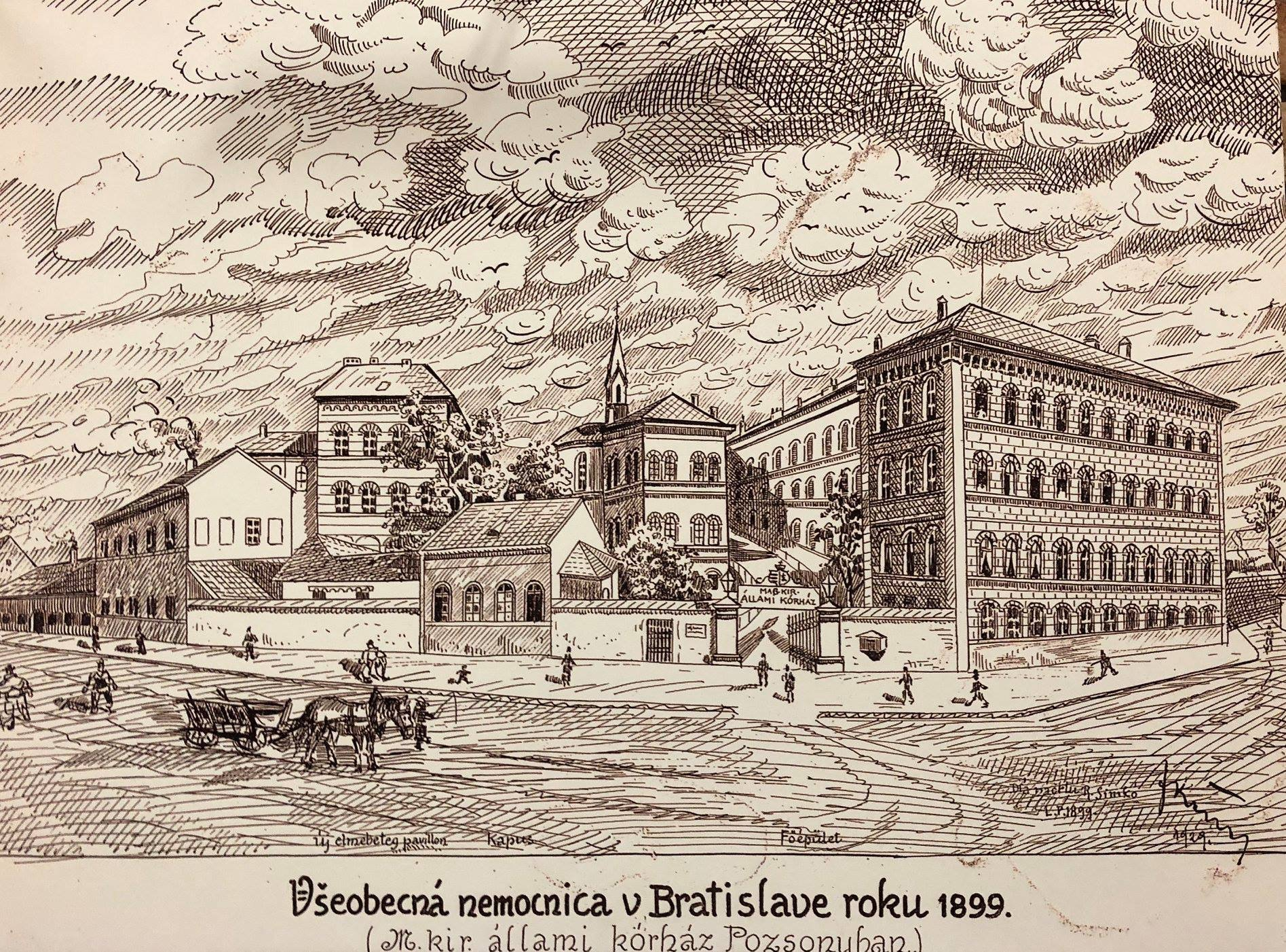 Zeichnung von R. Simko aus dem Jahre 1899 (Gesamtansicht)